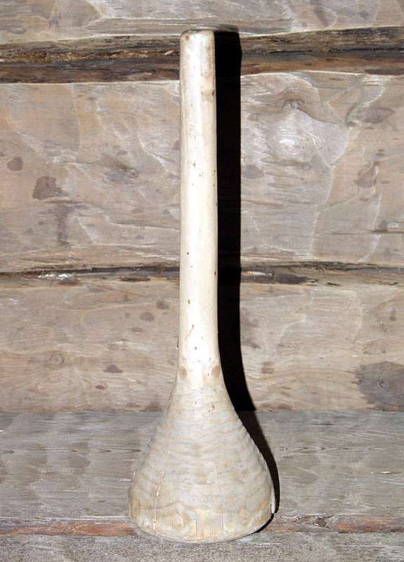 Smørstøter fra Kvam i Oppland. Lengde 42 cm. Foto: Haakon Harriss / Norsk Folkemuseum NF.1914-0313.